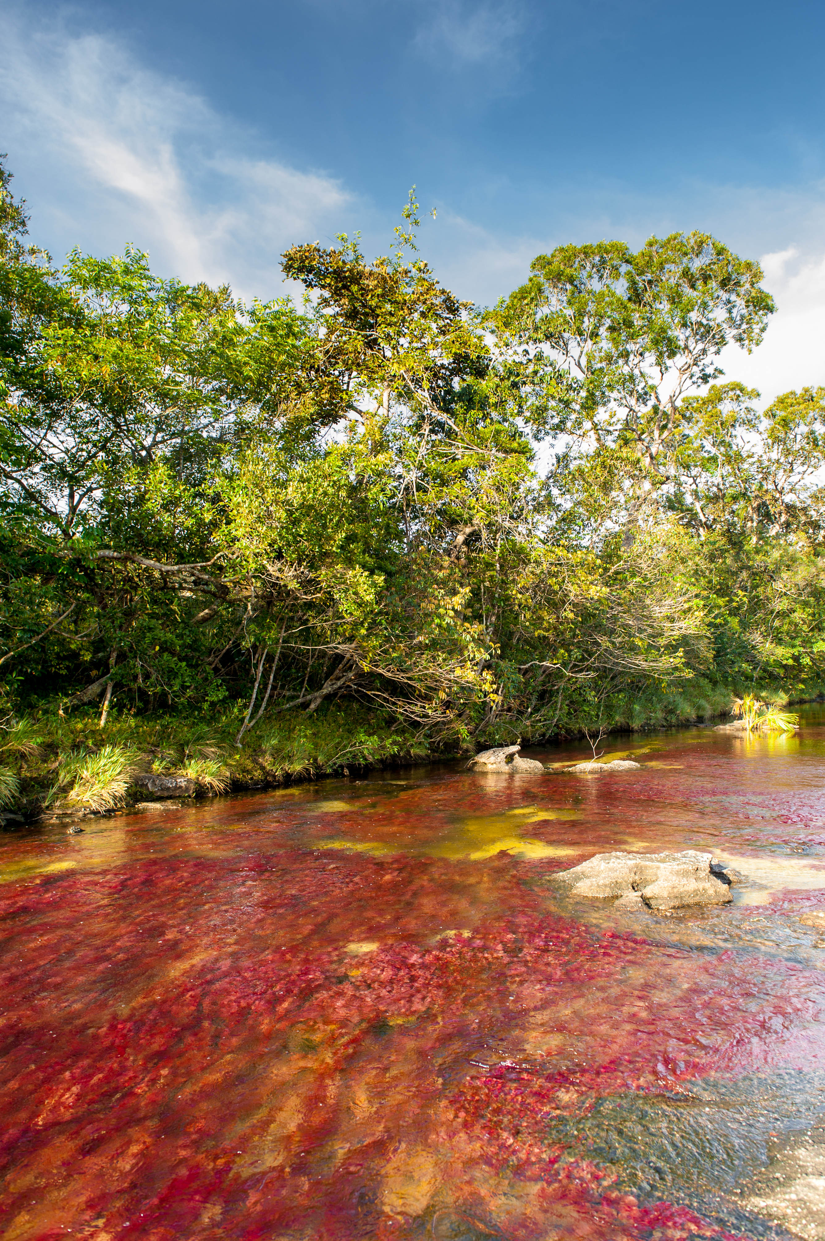 Hermoso río, de aguas coloridas, producto de plantas acuáticas que con el sol se tornan rojas, verdes. Está ubicado en Colombia, cerca del municipio de La Macarena, en el Meta. Fotografía Mario Carvajal (